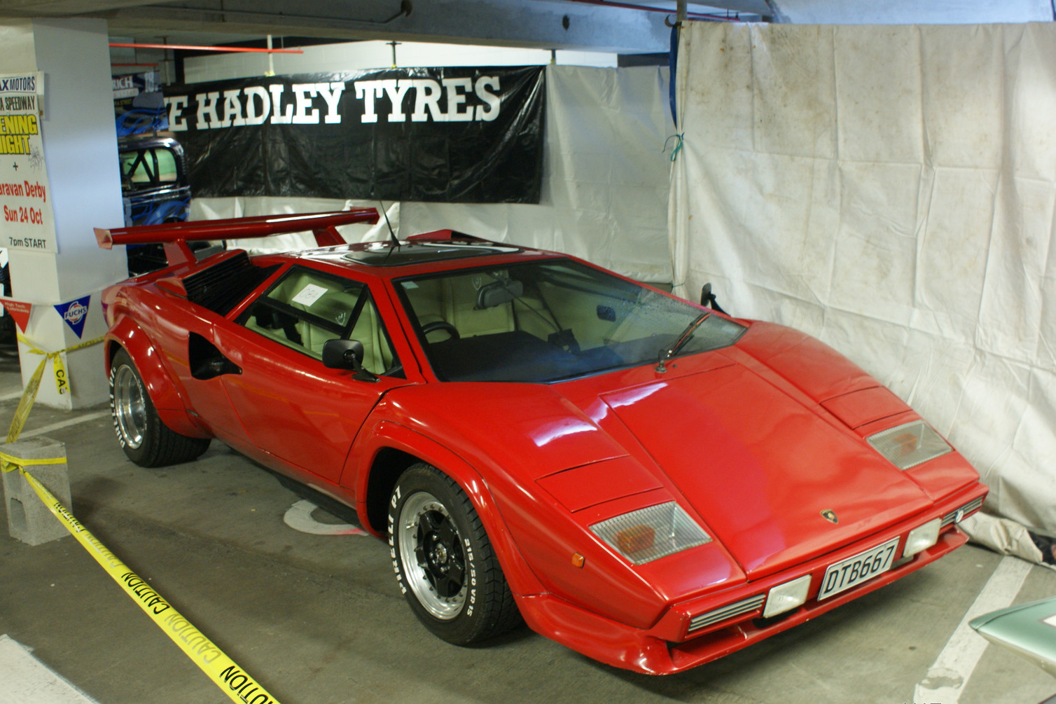 1996 LVVTA Mirage